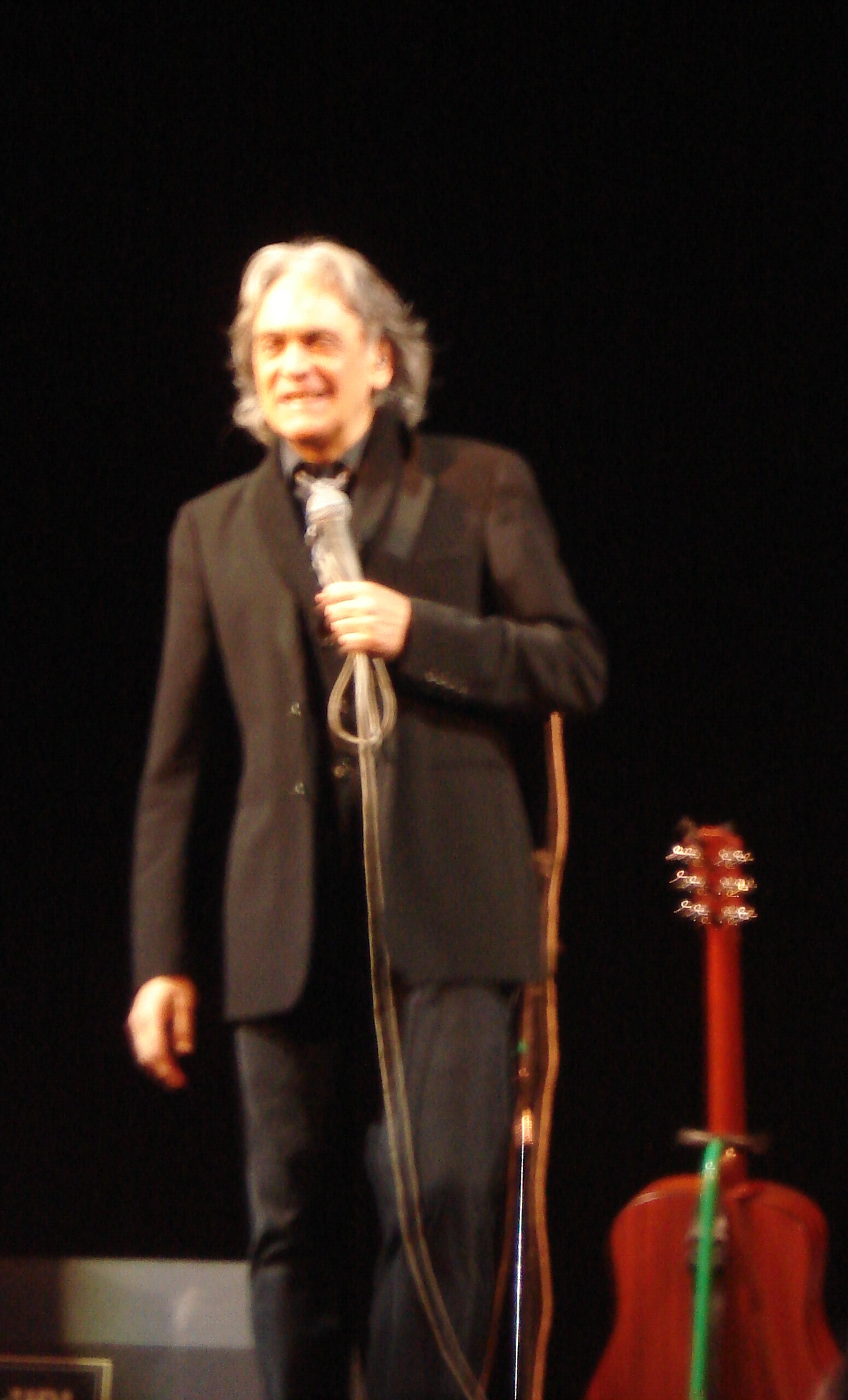 Риккардо Фольи в Воронеже 10 марта 2009